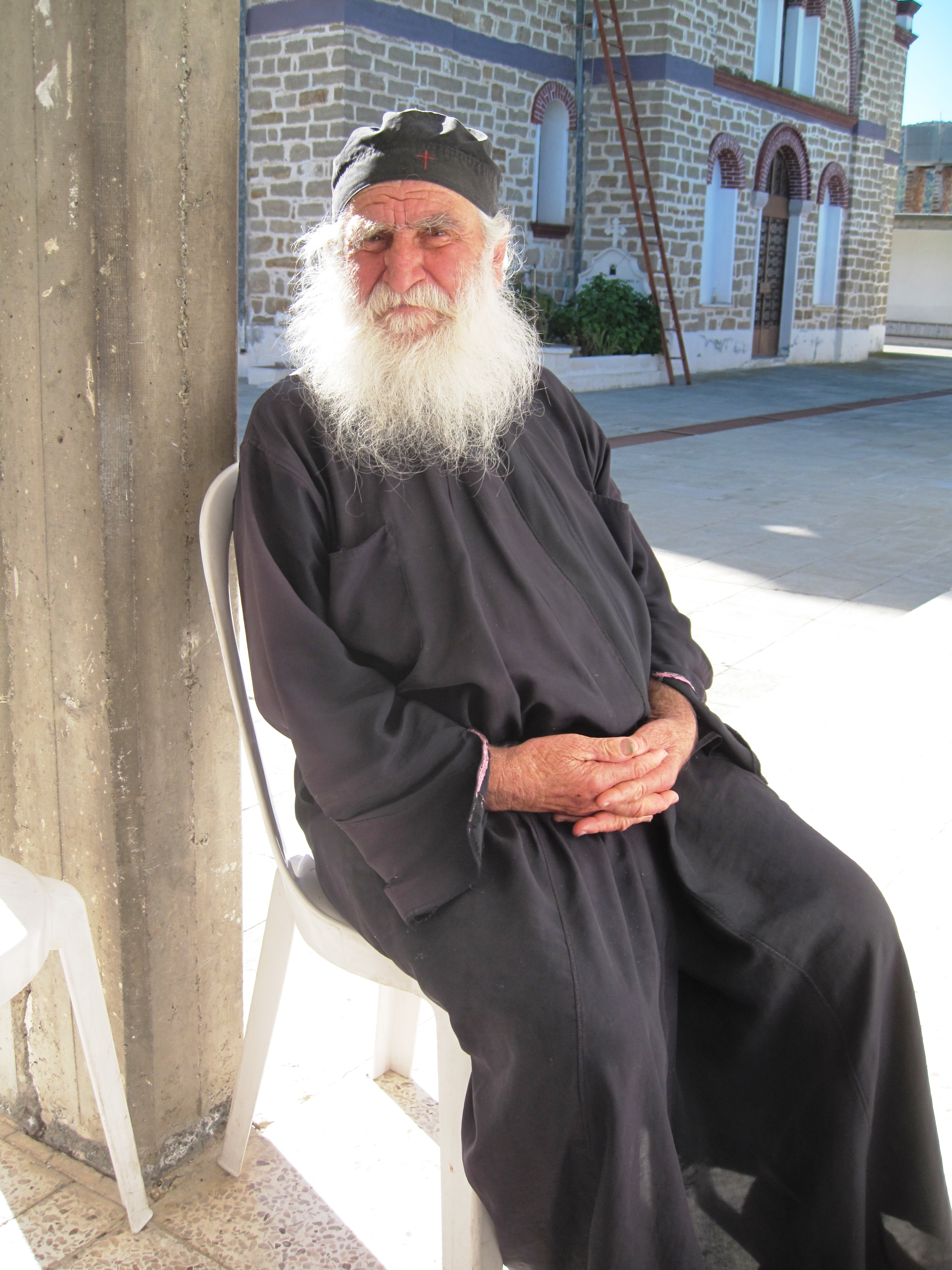 monnik in Panagidia Galaktotrofousa klooster, Cyprus